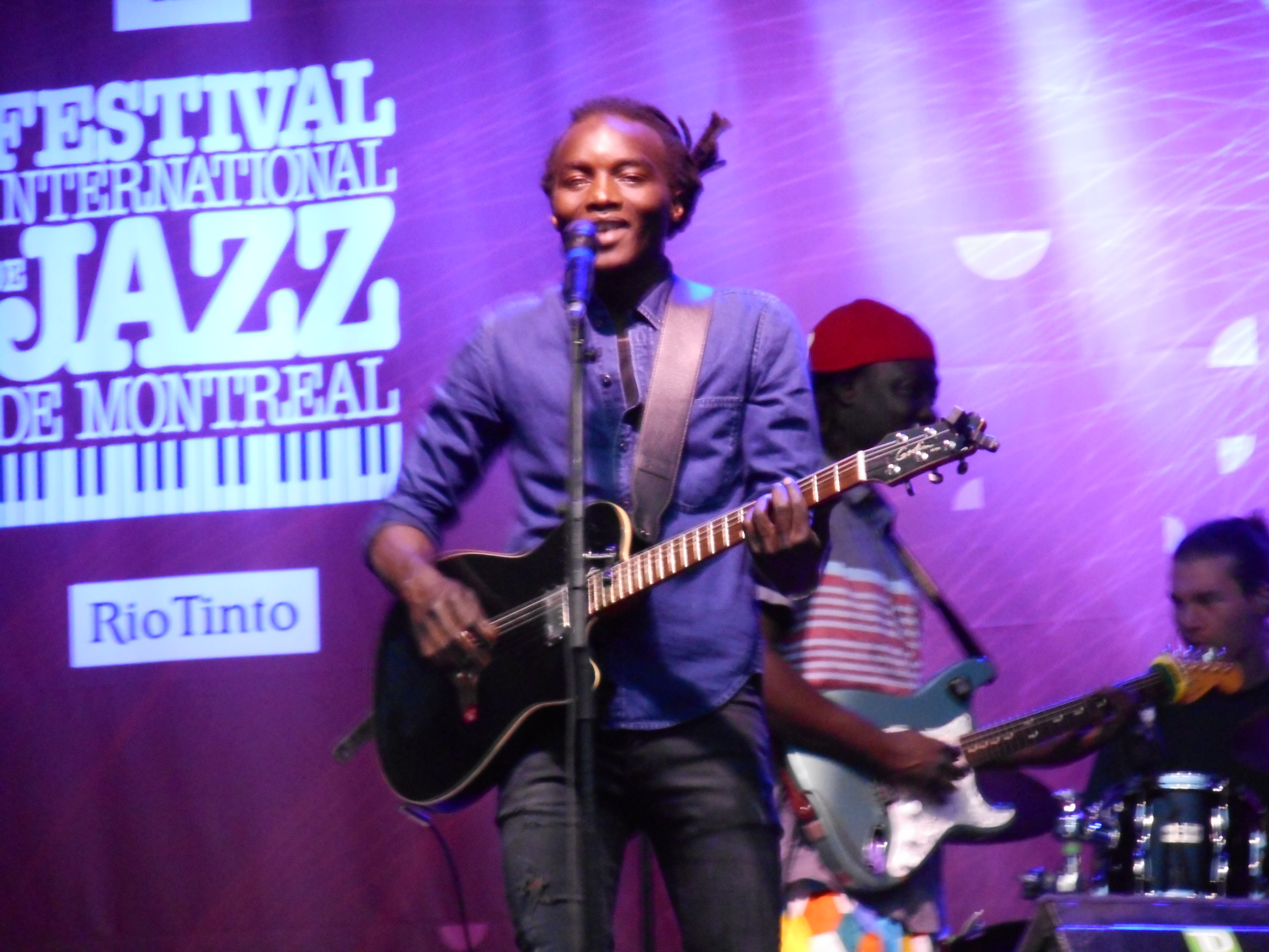 Spectacle de Ilam, le 3 juillet 2016, sur l'Esplanade, rue Clark, dans le cadre du Festival international de jazz de Montréal